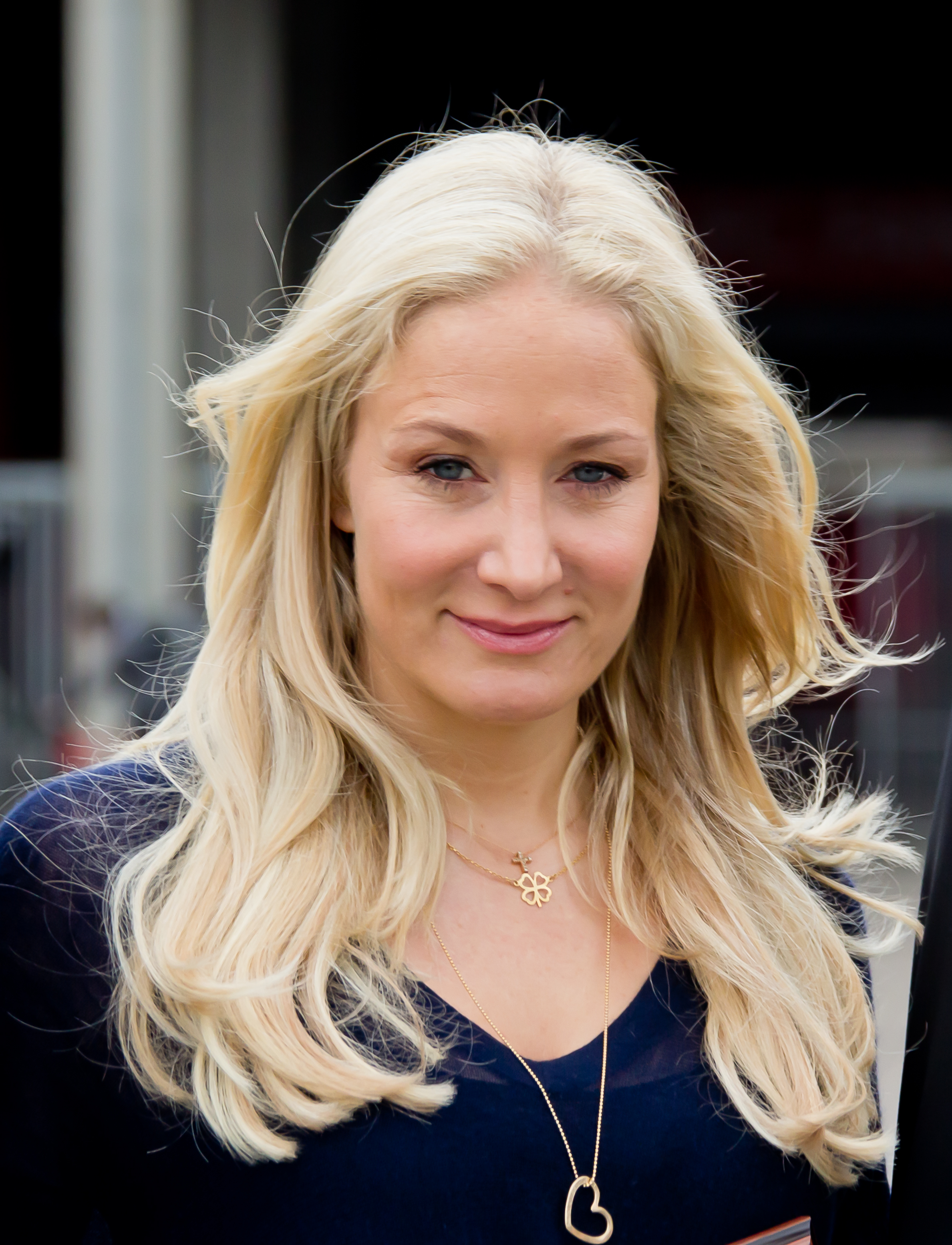 Pressegespräch im Sportamt der Stadt Köln: Vorstellung des Fan- und Familienfestes zum DFB-Pokalfinale der Frauen am 12. Mai 2012. Übergabe der Urkunden zur Ernennung von Janine Kunze und Liz Baffoe als Sportbotschafterinnen. Das Foto zeigt: Janine Kunze